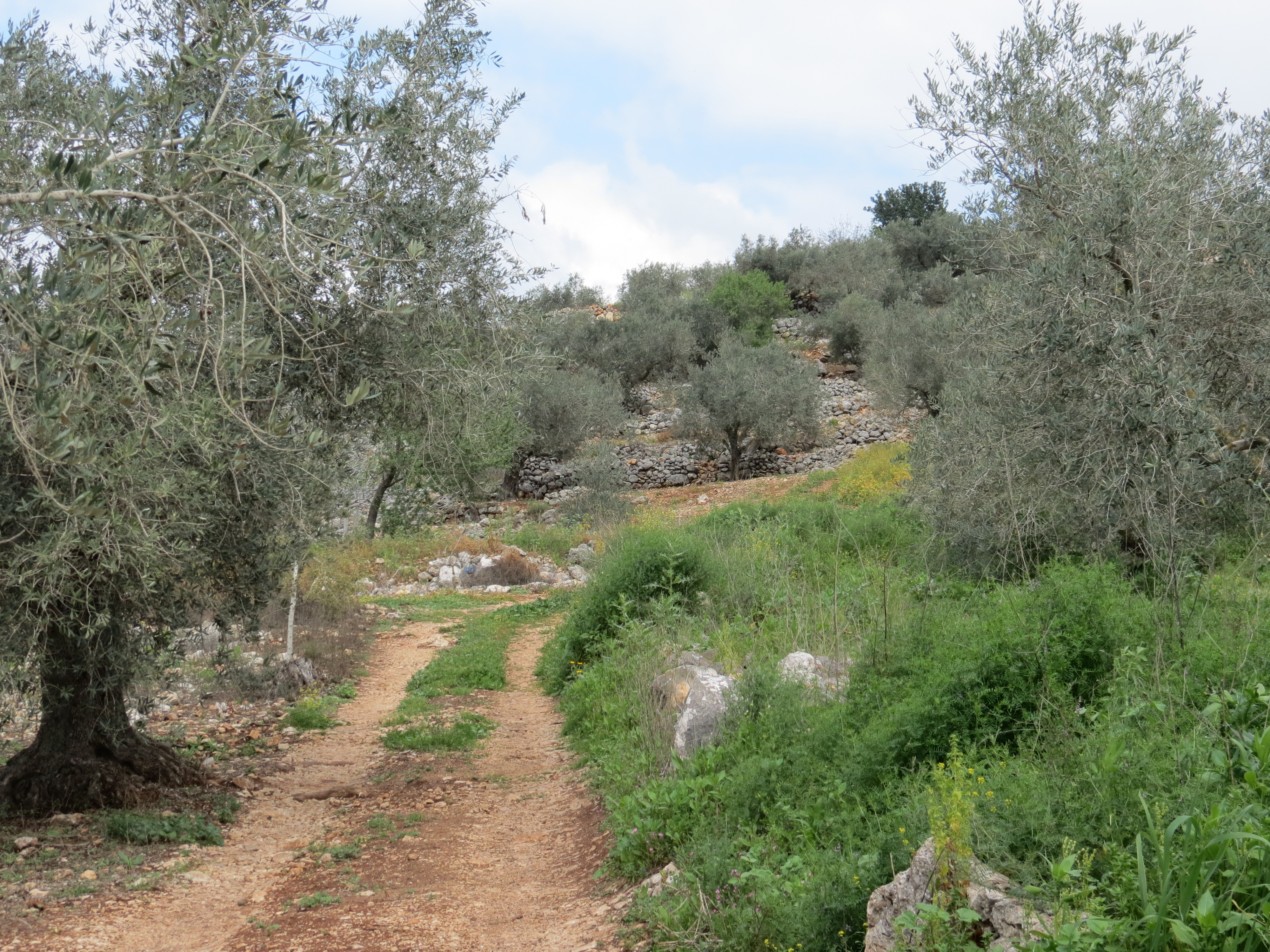 חורבת מחוז